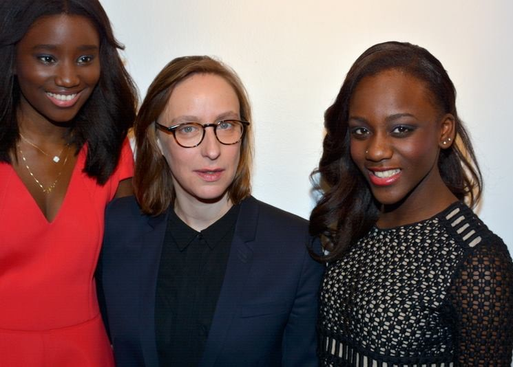 Cérémonie des prix Lumières Depicted people: Karidja Touré, Céline Sciamma and Assa Sylla AnnotationsThis image is annotated: View the annotations at Commons